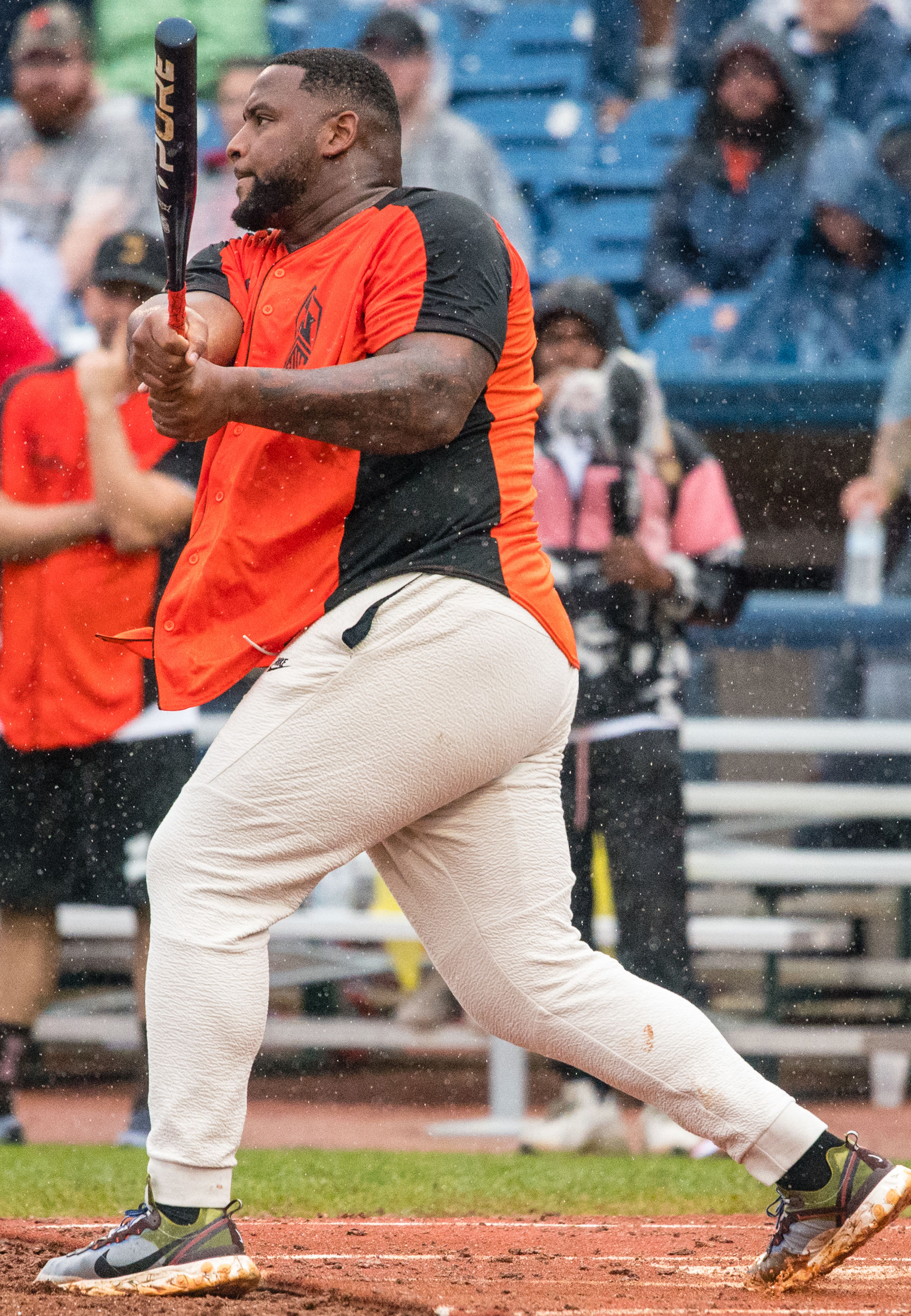 Devon Godchaux